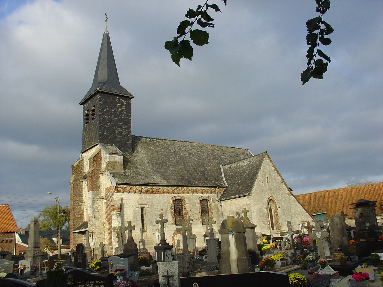 Église de Monchy-Breton